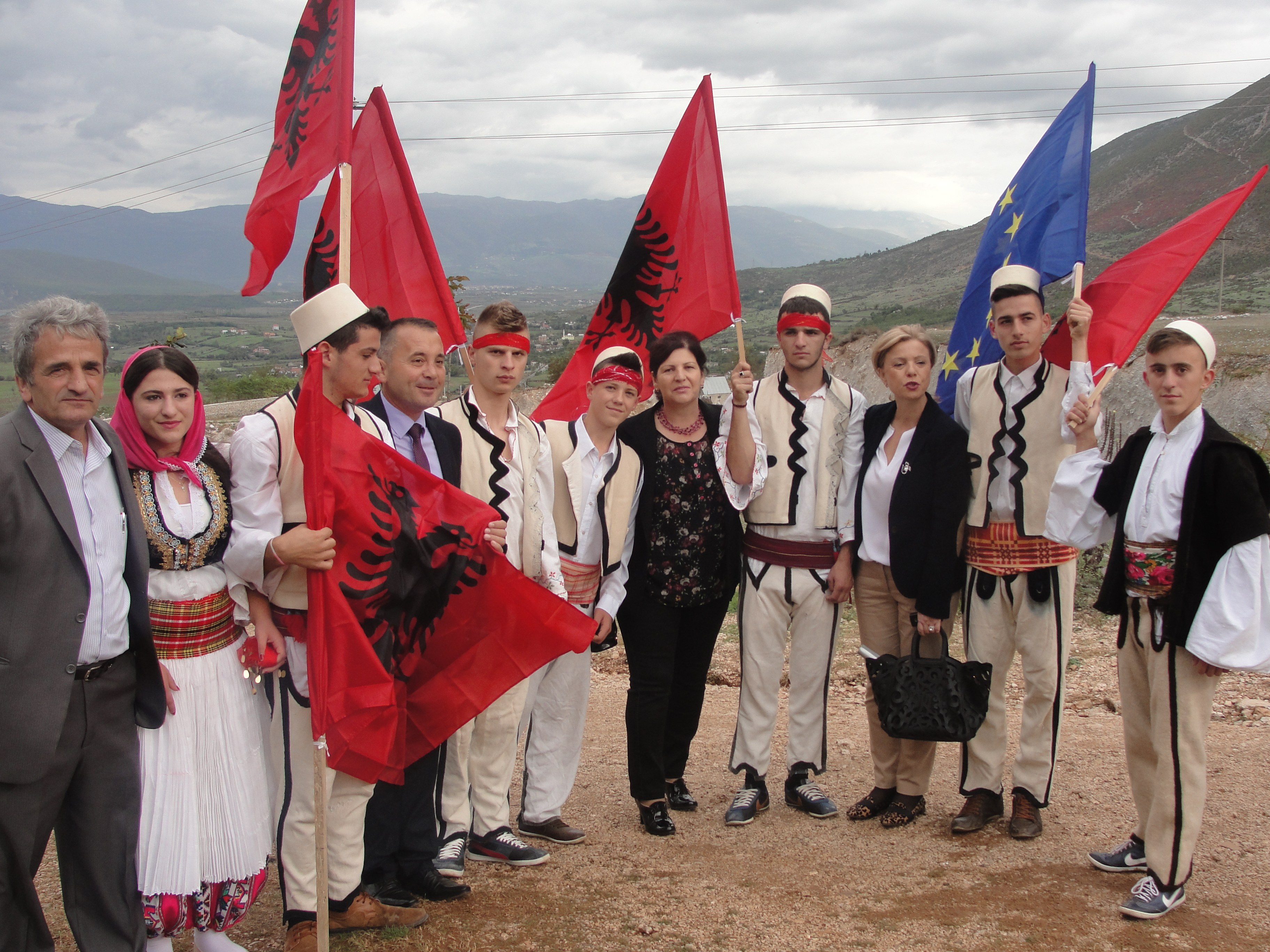 Diat e Flamurit